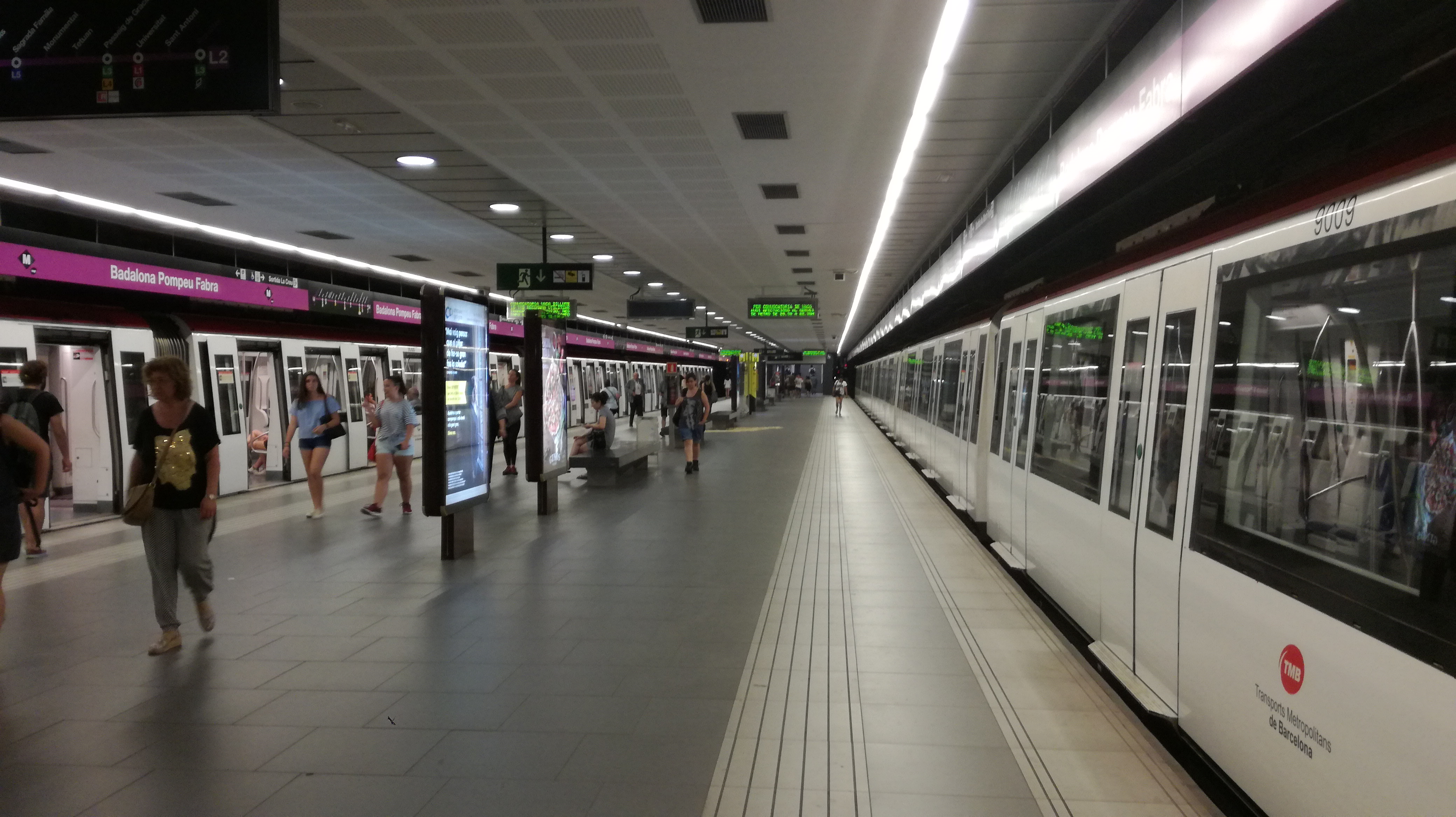 Станция "Бадалона Пумпеу Фабра", Барселонский метрополитен. На пути справа отстаивается поезд.